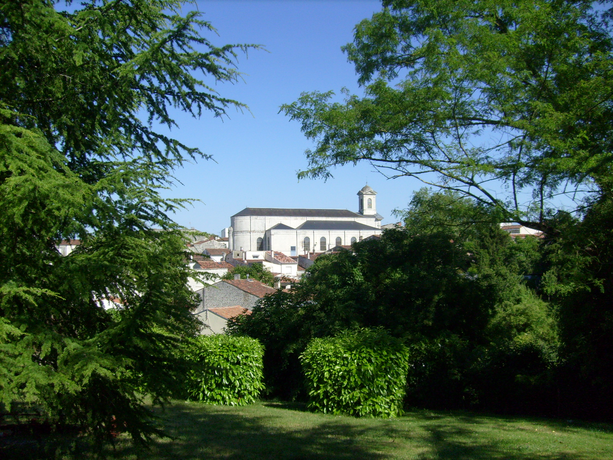 Eglise Saint-Vivien vue depuis le parc des thermes Saint-Saloine